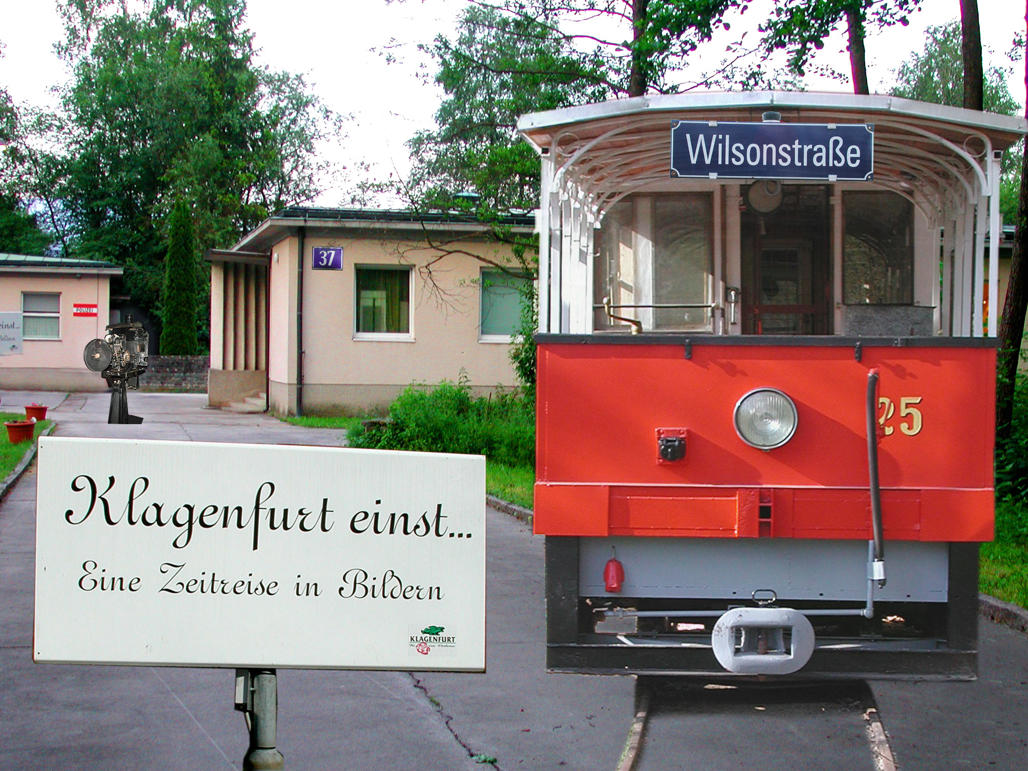 Ausstellungen im ehem. ORF-Mittelwellen-Sender See am Lendkanal und Akkutriebwagen der Lendcanaltramway